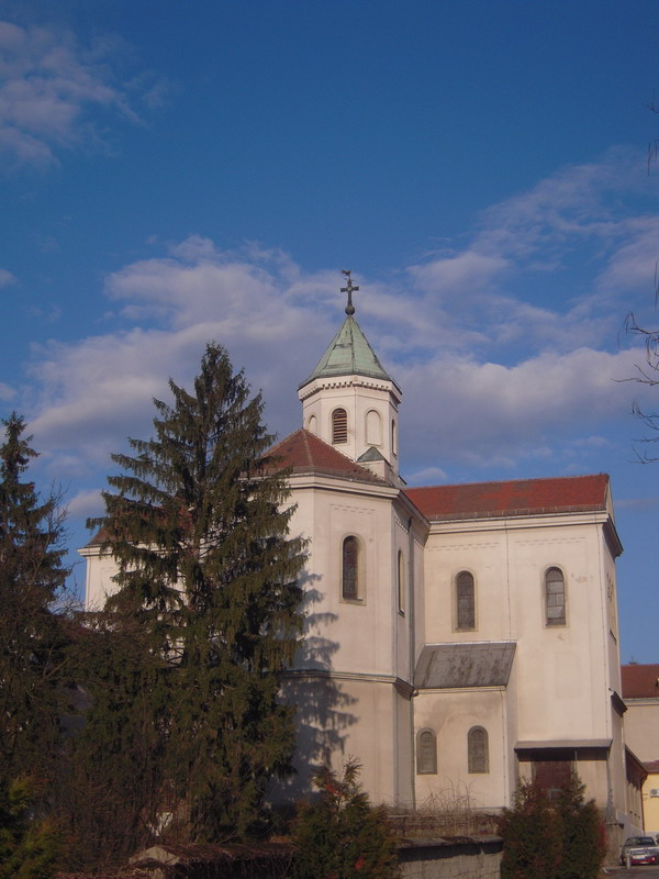 Самостан Марија Звијезда у Трапистима (Бања Лука)